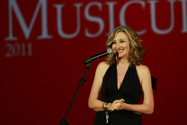 Attrice